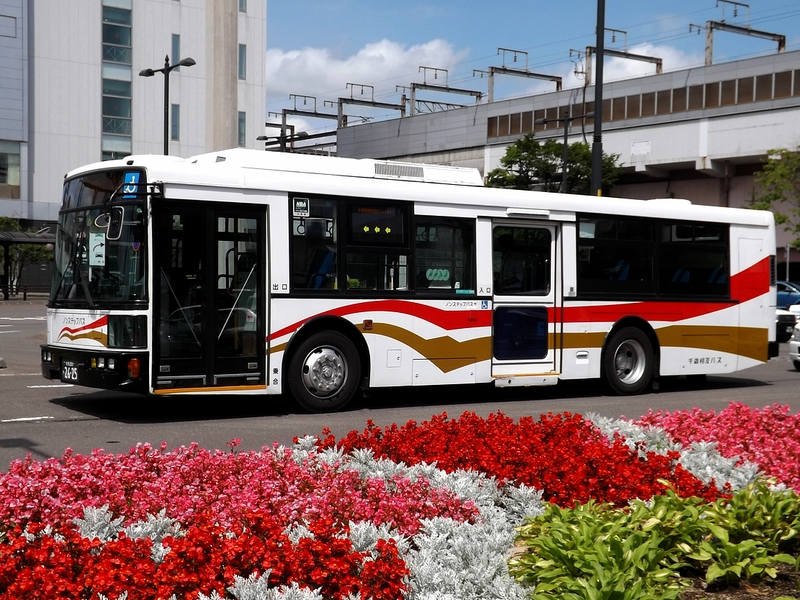 千歳相互バス 札幌200か2625 UD KC-UA460KAM ノンステップ車両